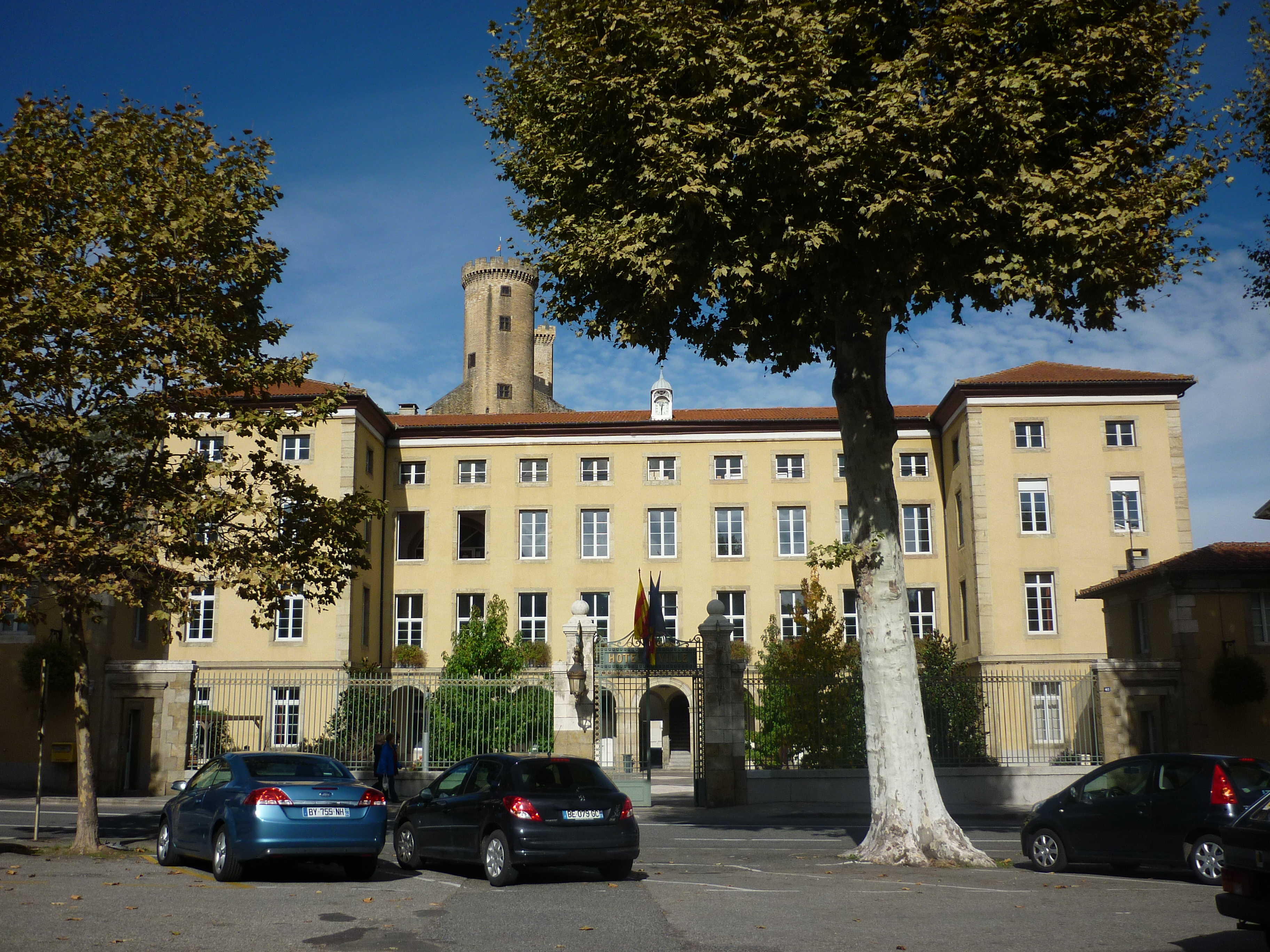 Foix (Ariège, Pyrénées) hôtel de ville, mairie